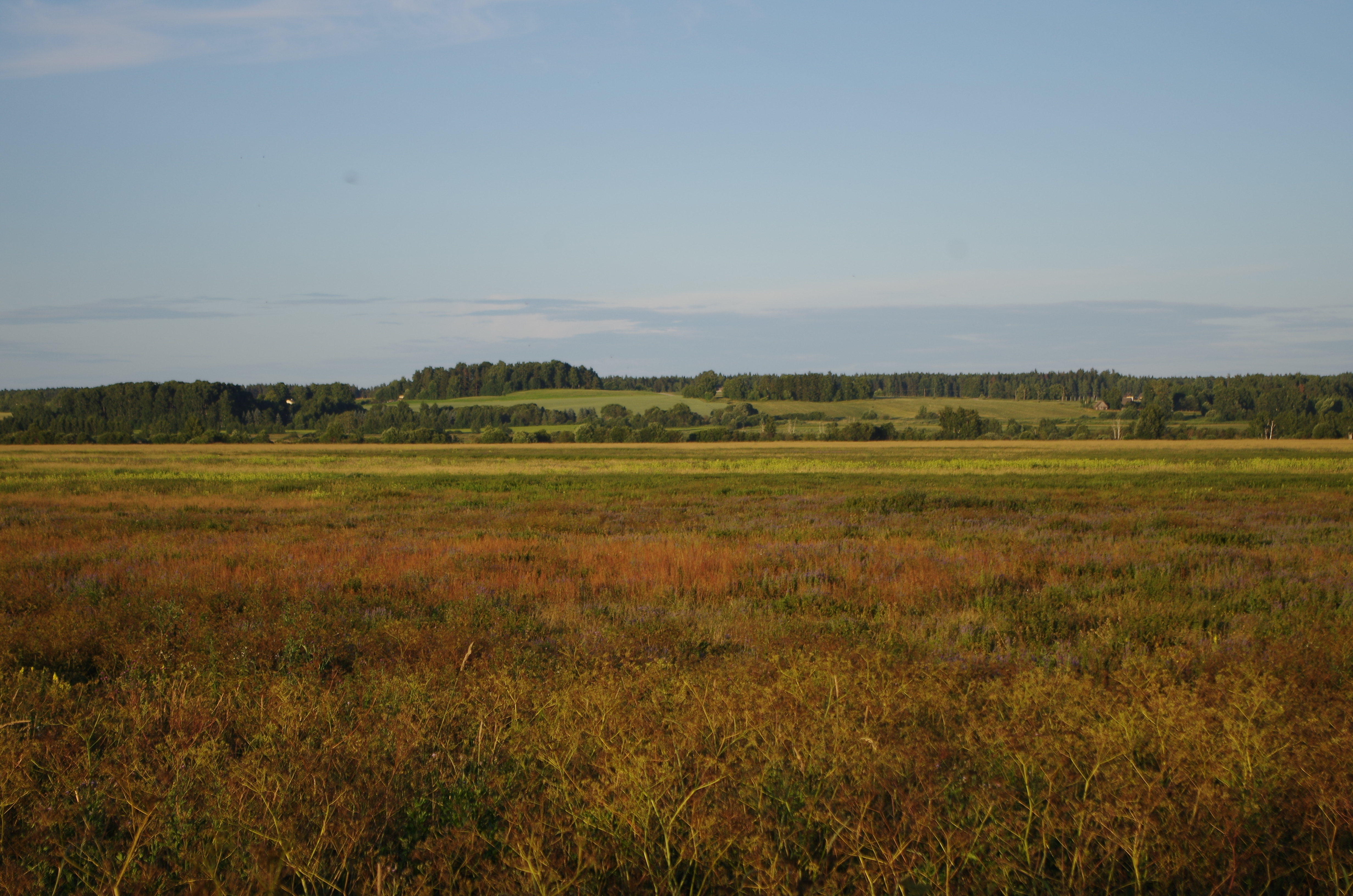 Vaade aardla poldrile